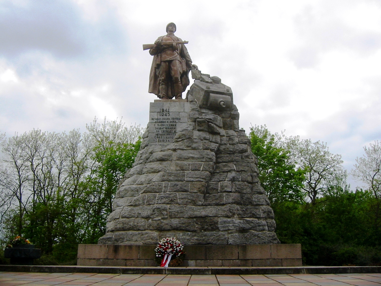 Monumentalplastik von Kerbel und Zigal. Inschrift „1941 – 1945 / Ewiger Ruhm den Helden, gefallen in den Kämpfen gegen die faschistischen Eindringlinge für die Freiheit und Unabhängigkeit der Sowjetunion“. Die Gedenkstätte Seelower Höhen erinnert in der brandenburgischen Kreisstadt Seelow (Landkreis Märkisch-Oderland) an die Schlacht um die Seelower Höhen im Jahr 1945.